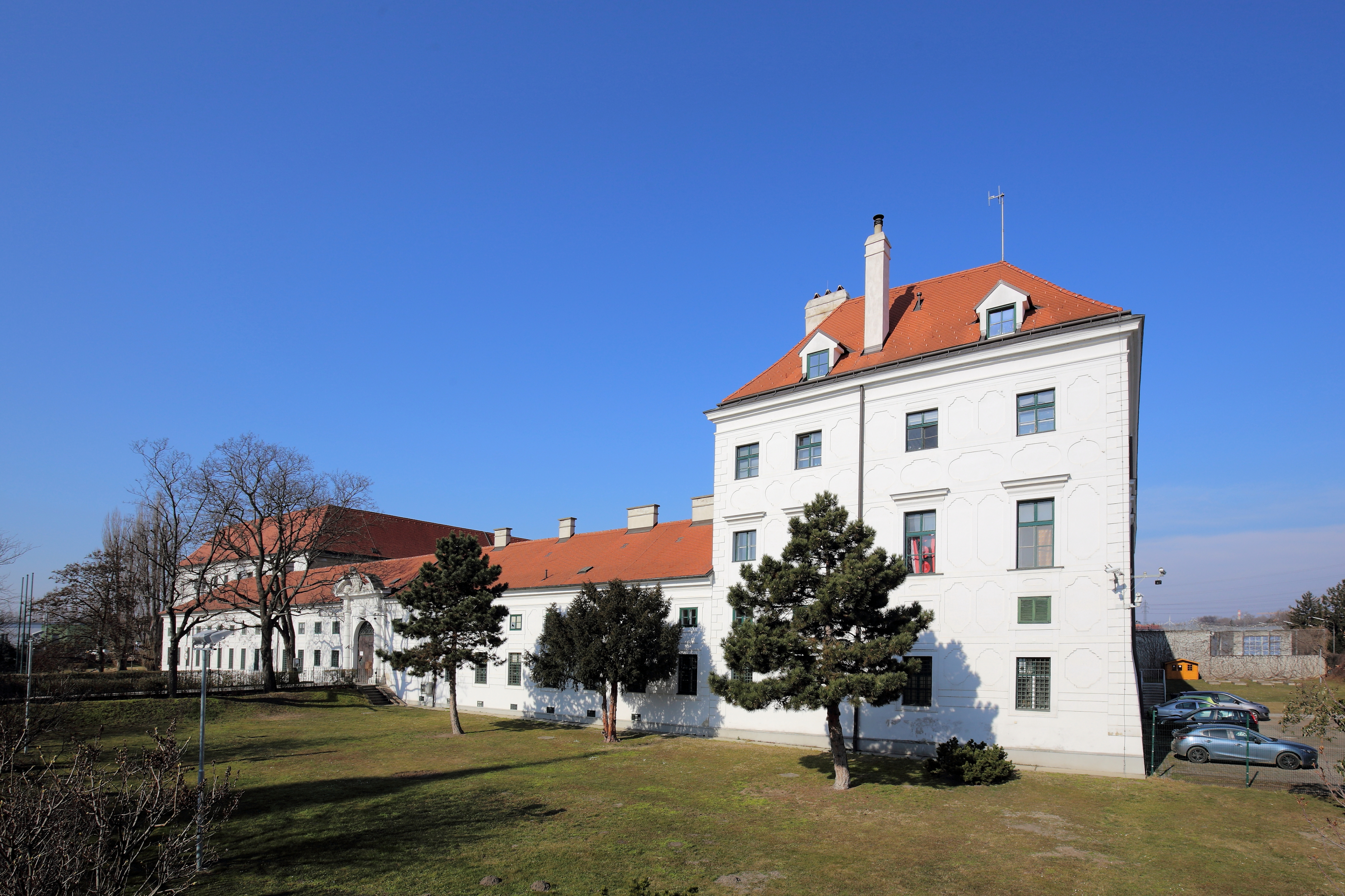 Südsüdostansicht des Schlosses Kaiserebersdorf bzw. jetzige Justizanstalt Wien-Simmering in der österreichischen Bundeshauptstadt Justizanstalt Wien Simmering.